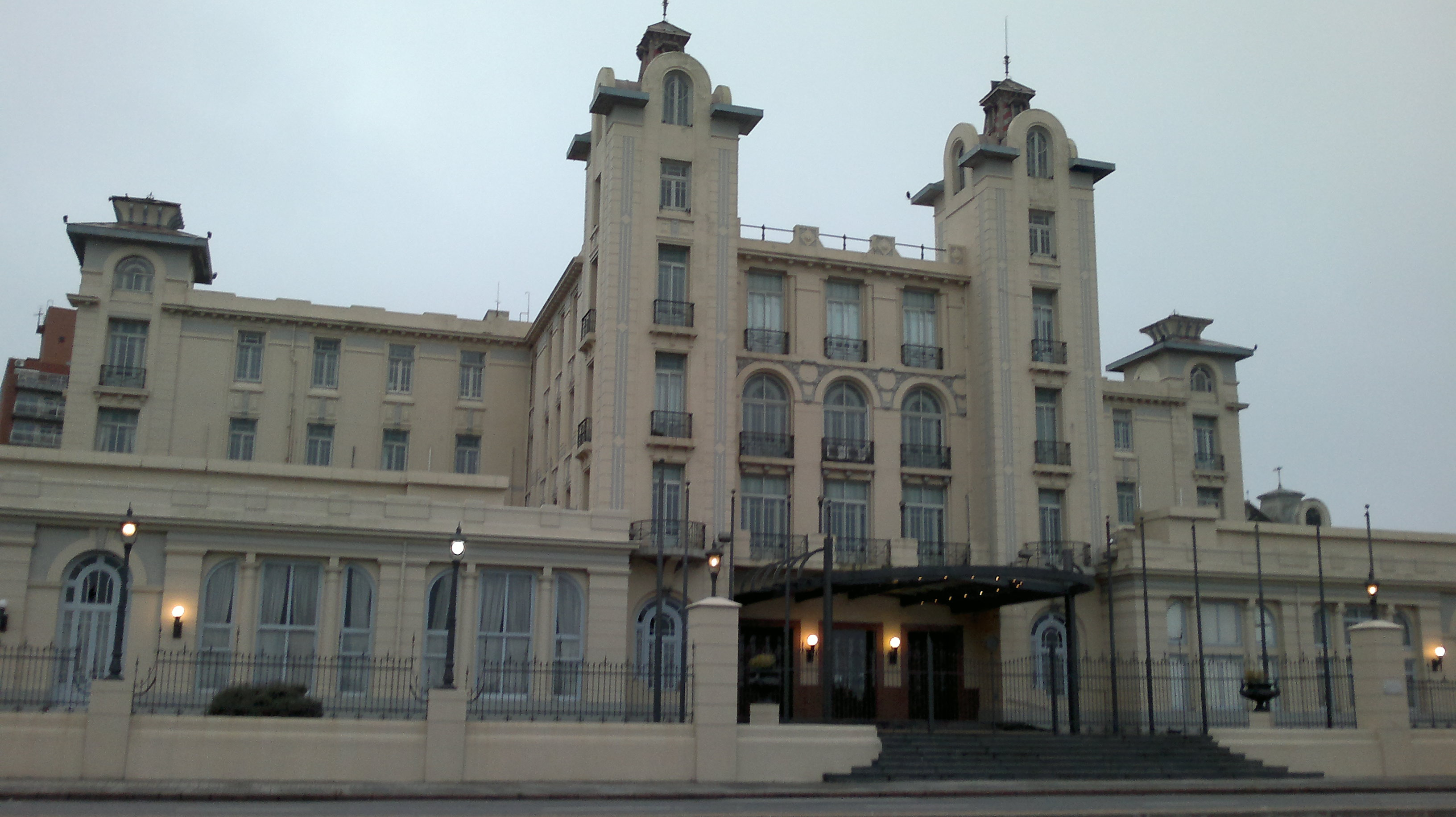 Sede del Mercosur. Montevideo. Uruguay